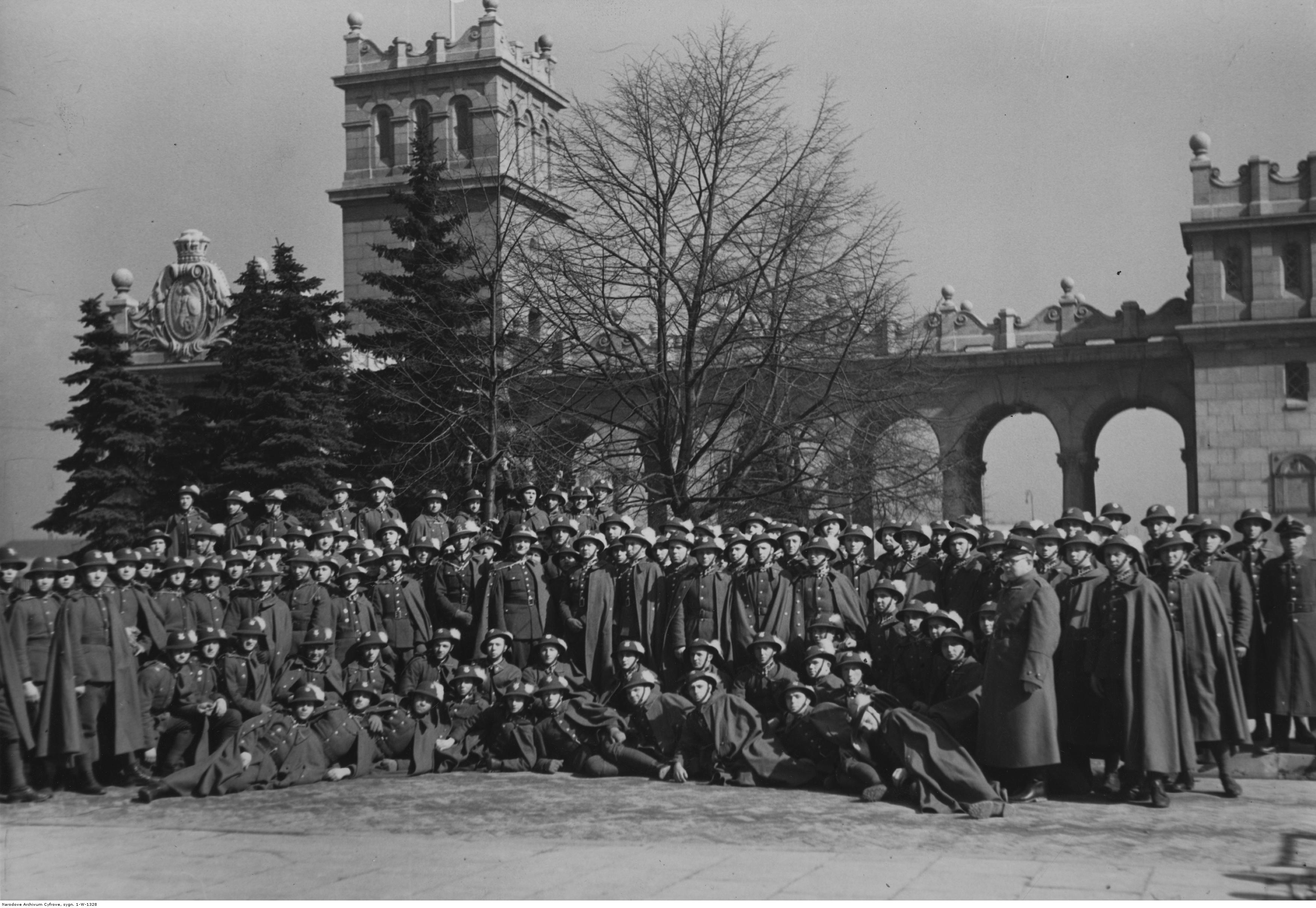 Wycieczka 6 Pułku Strzelców Podhalańskich w Warszawie; 18 marzec 1936 r. Koncern Ilustrowany Kurier Codzienny - Archiwum Ilustracji. Sygnatura: 1-W-1328